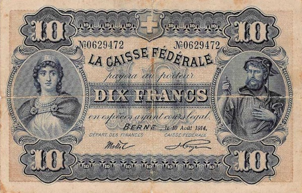 Svájci 1914-es 10 frankos államjegy francia felirattal.